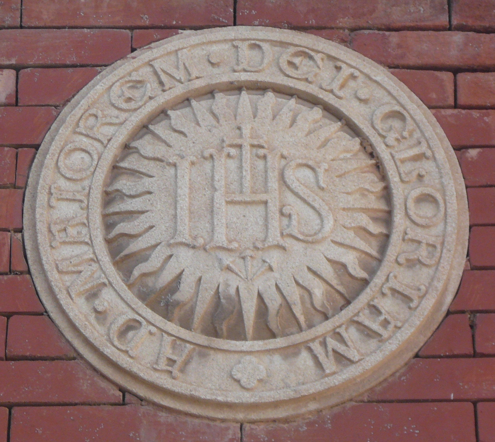 Col·legi Sant Ignasi de Loiola (Barcelona)